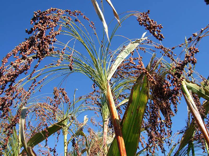 Sorghum arundinaceum